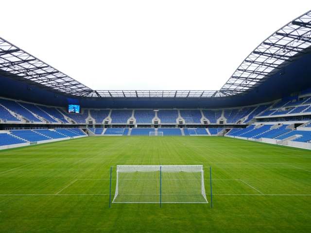 pelouse du nouveau stade